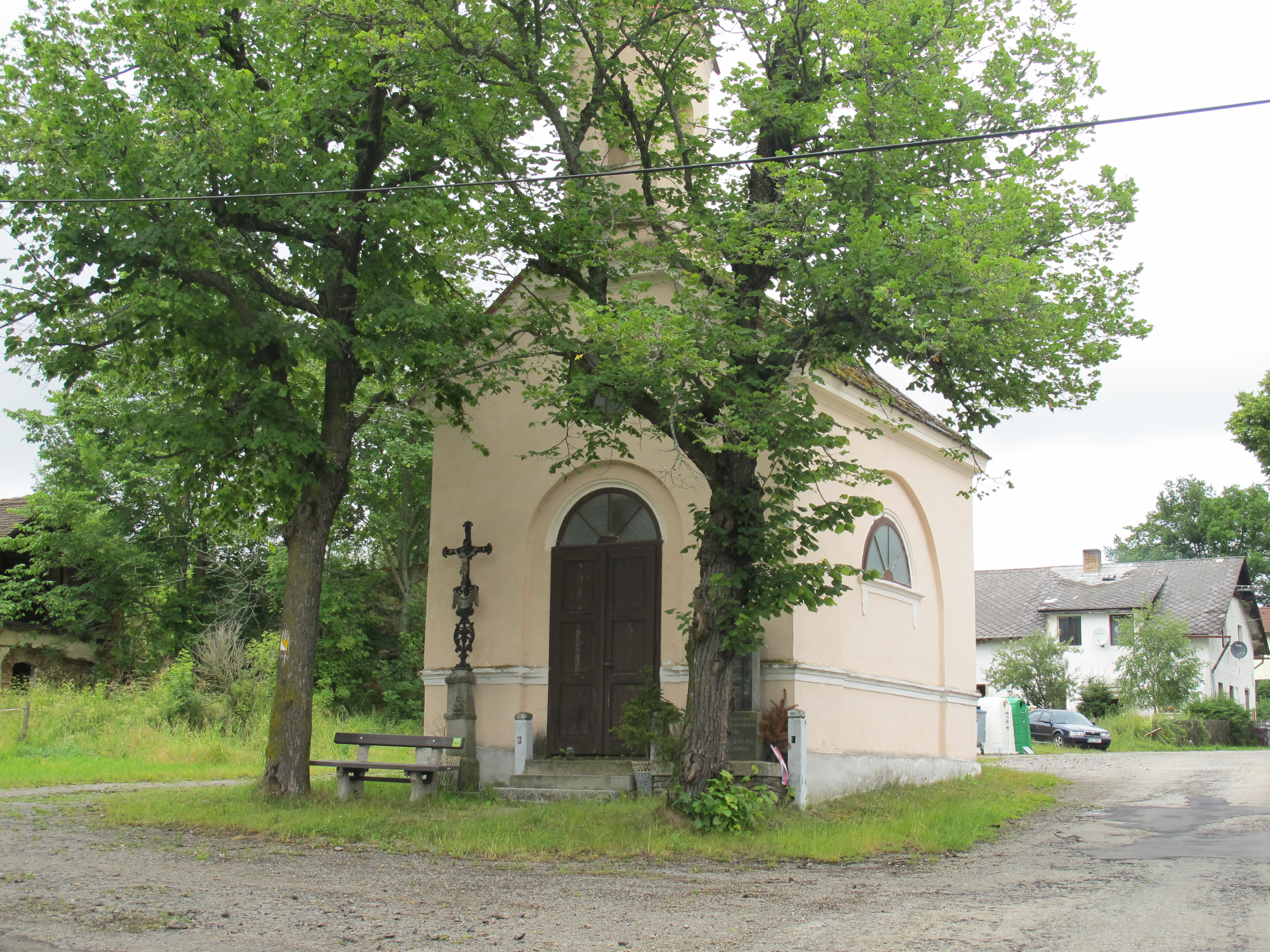 Kaple Povýšení sv. Kříže v Klášterci u Vimperka